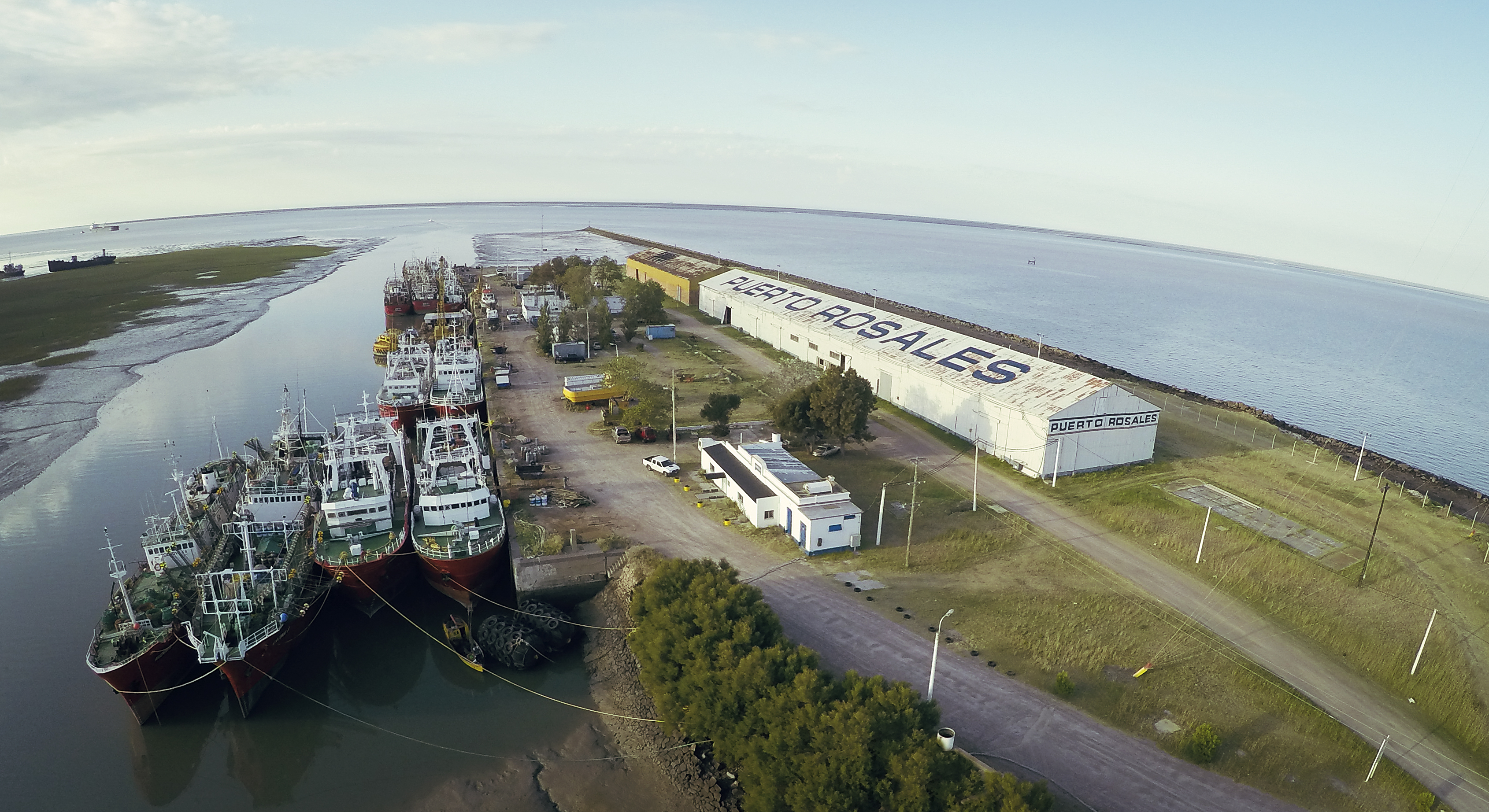 Vista aérea de Puerto Rosales (Foto: Maurucio Clermont)